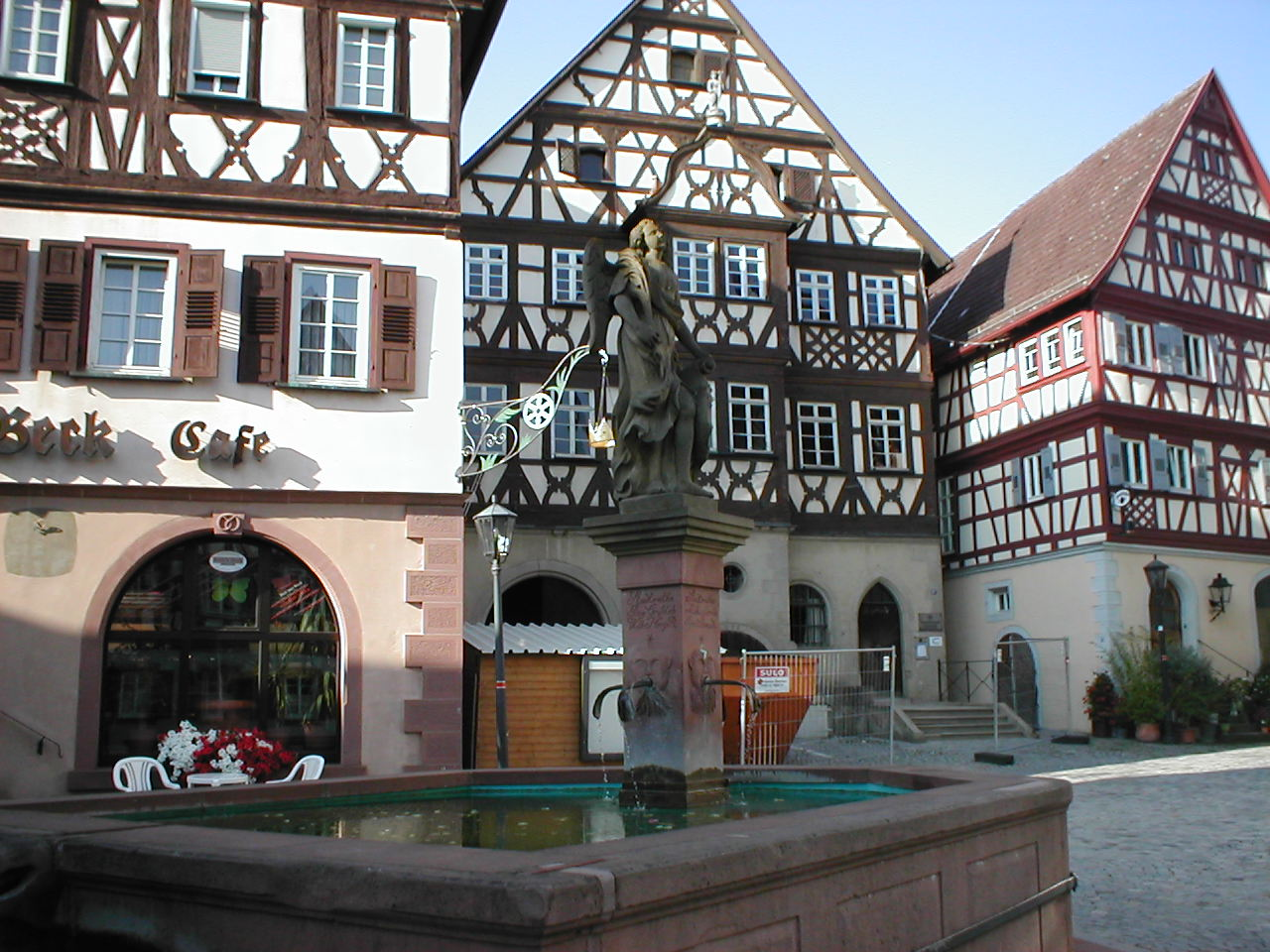 Ratsbrunnen in Neudenau, dahinter mittig das Rathaus von 1587, rechts ein Gebäude von 1631.